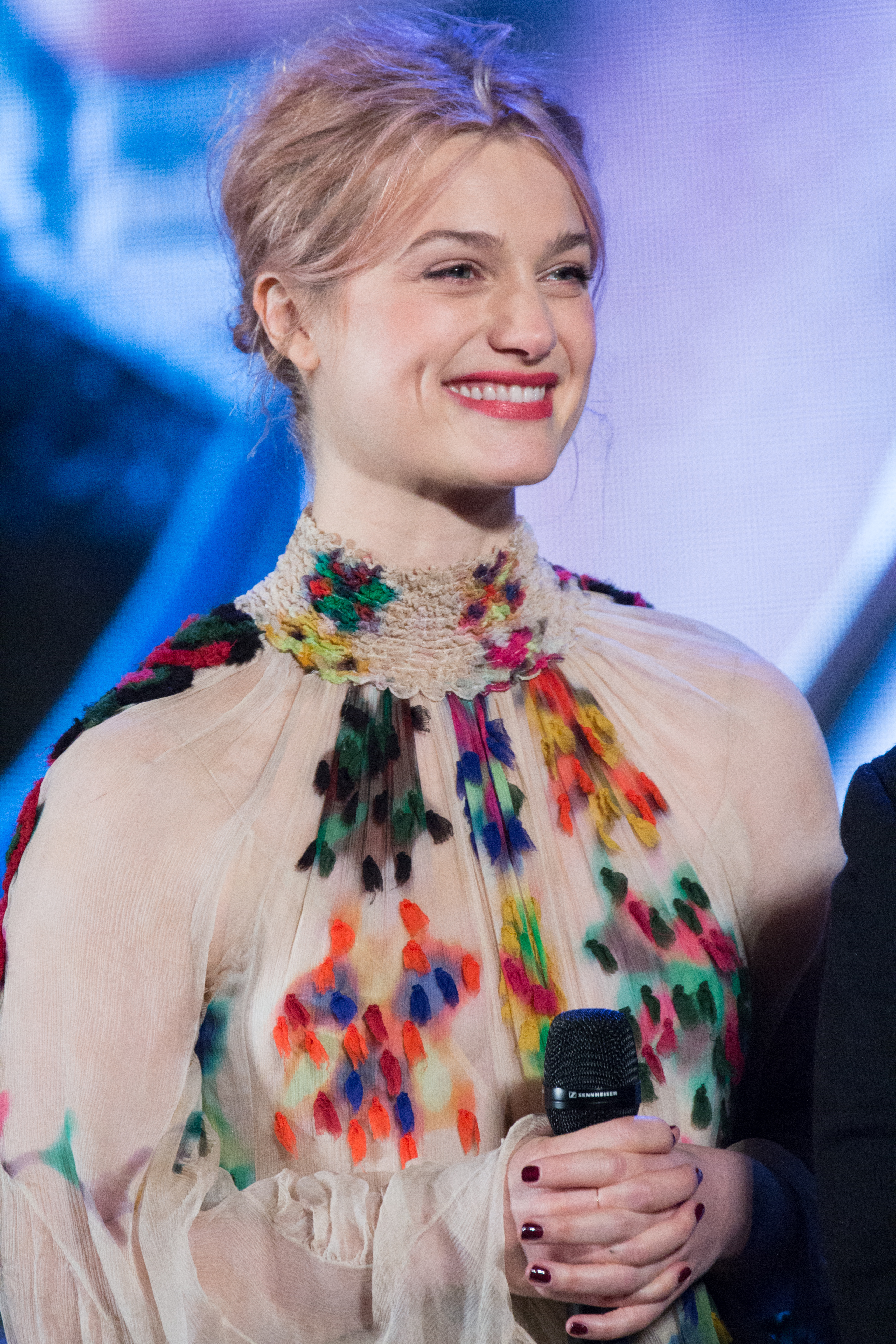 ファンタスティック・ビーストと魔法使いの旅 ジャパン・プレミア レッドカーペット アリソン・スドル